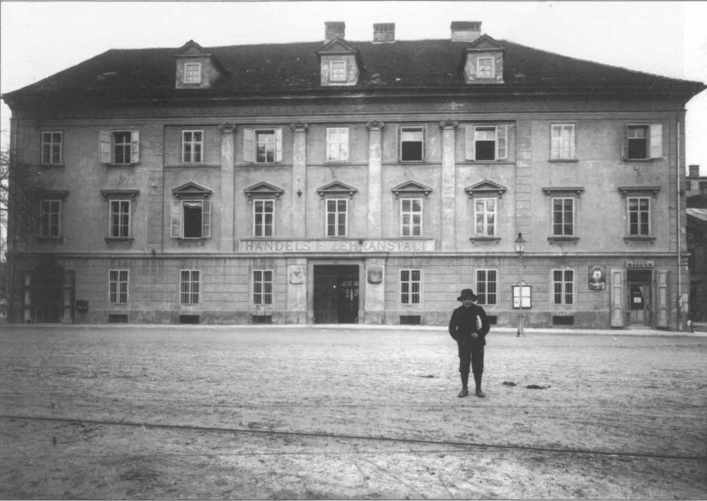 Mahrova hiša na Cesarja Jožefa trgu (sedaj Krekovem trgu 10)